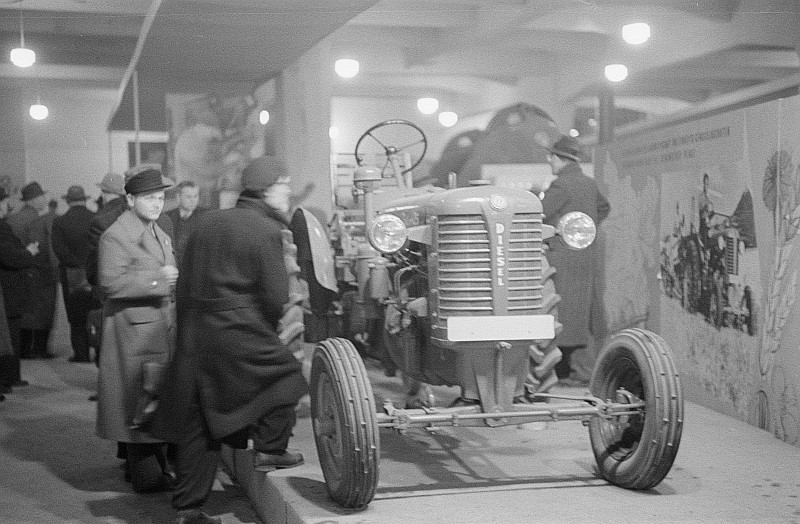 Original image description from the Deutsche FotothekMessebesucher vor einem Traktor